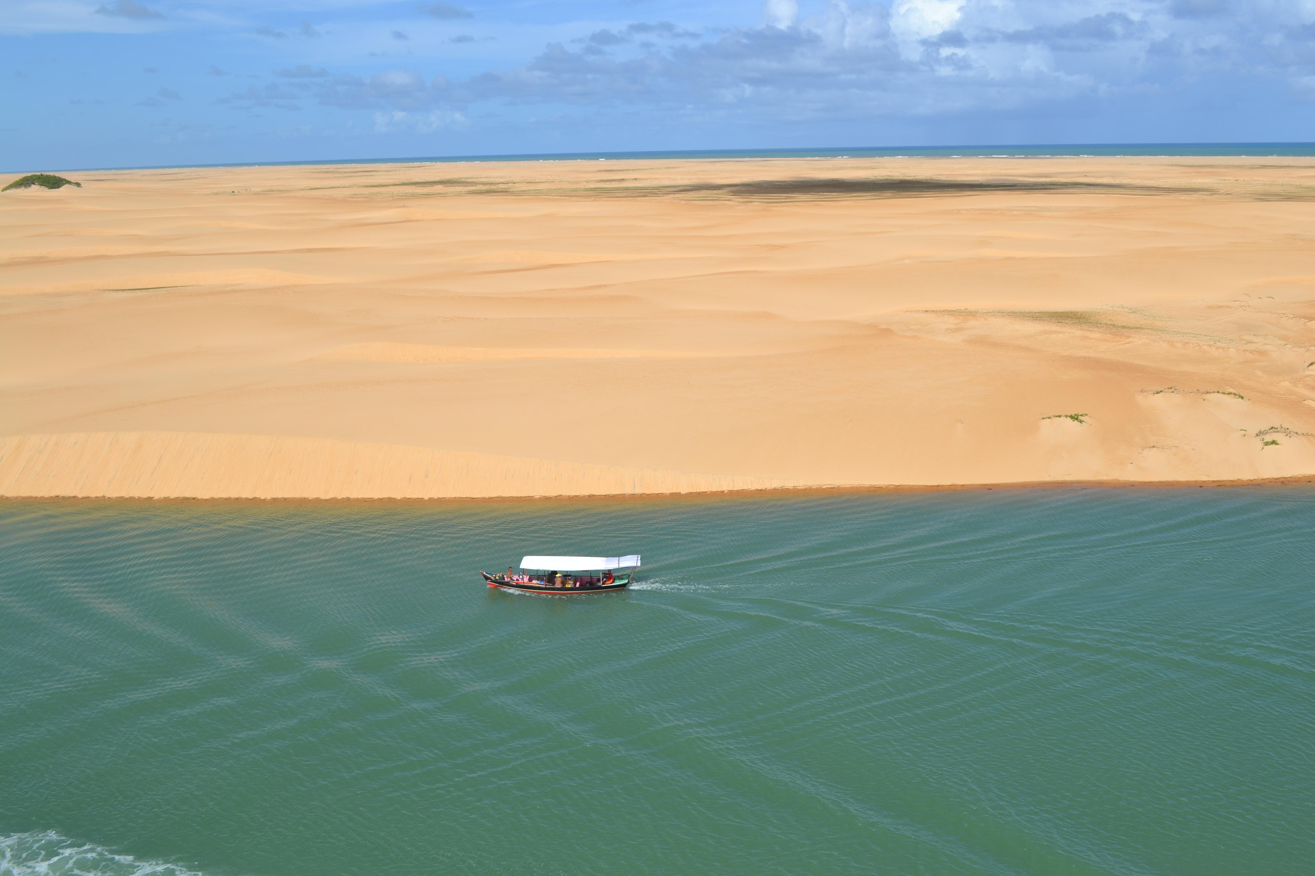 Descrição_para_sua_foto